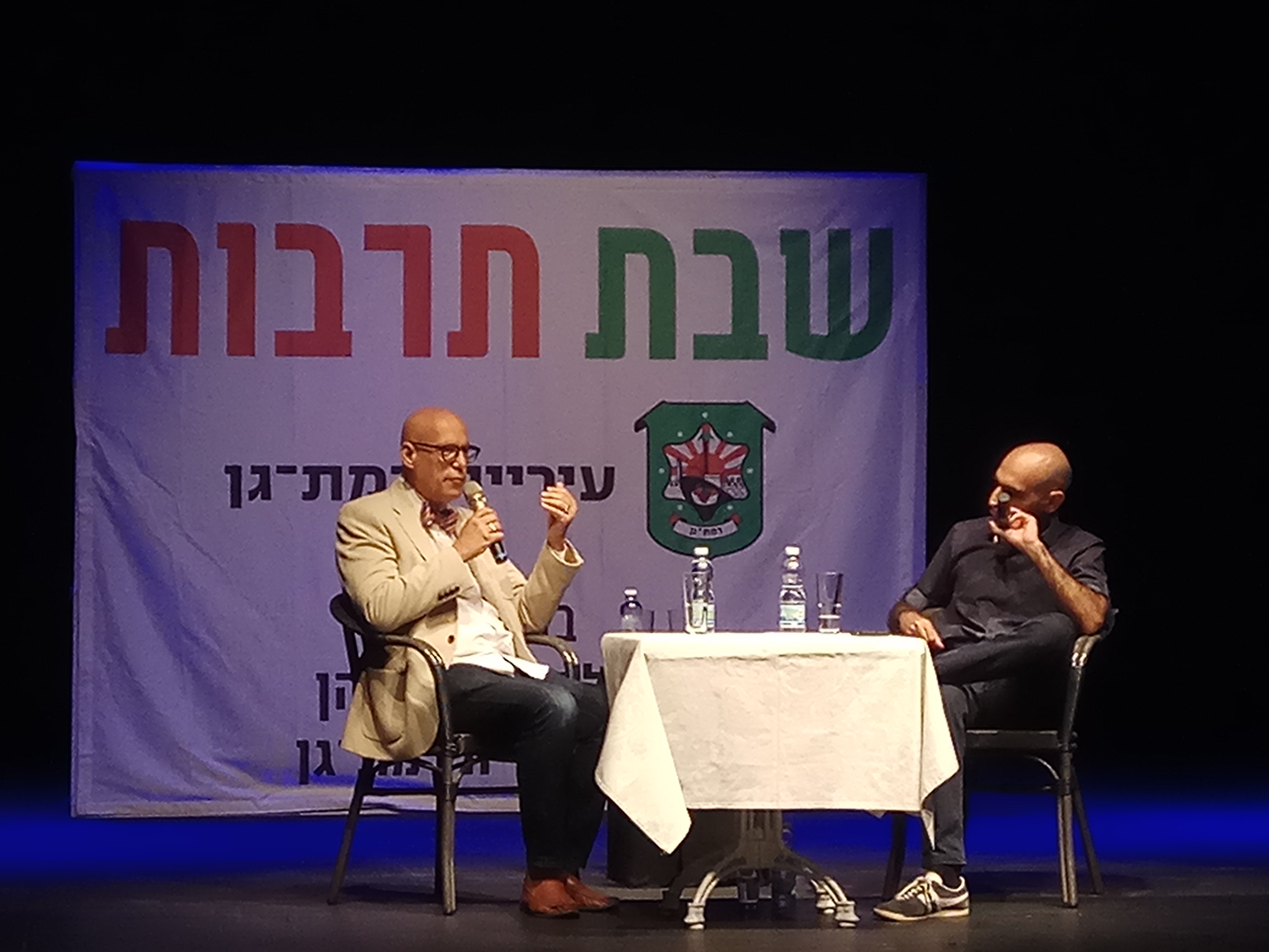 בני ציפר באירוע שבתרבות ברמת גן עם אסף ליברמן